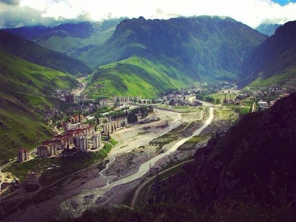 Летний Тырныауз